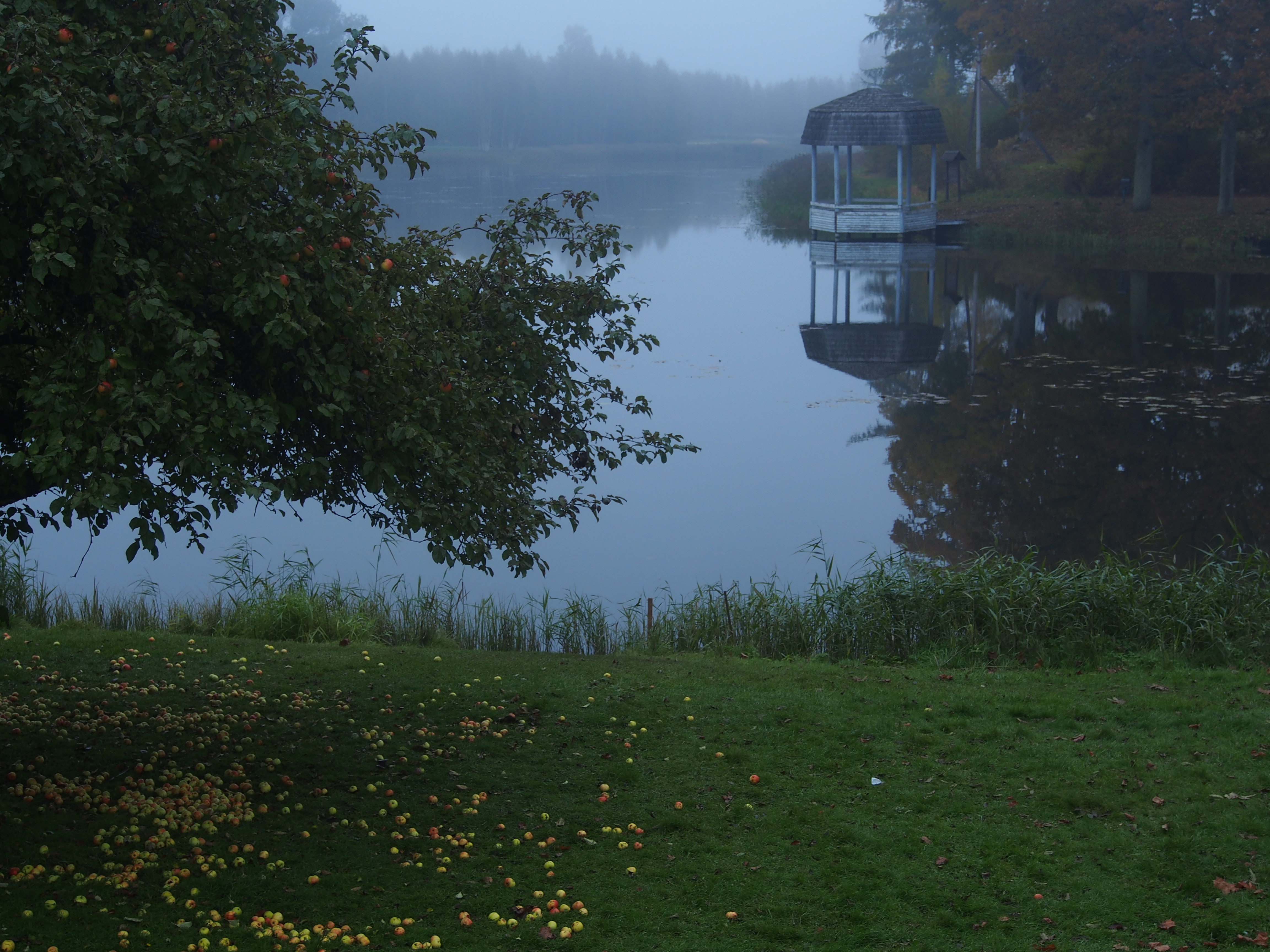 Esiplaanil õunapuu, järvel udu ja valge lehtla.